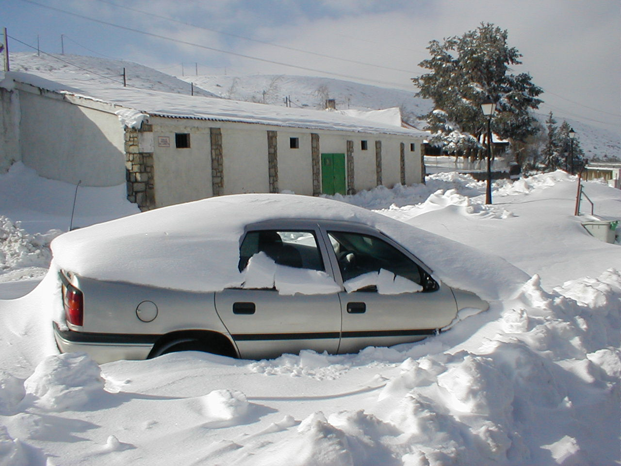 Walon: oto dins l' nive al passåjhe di Somosierra